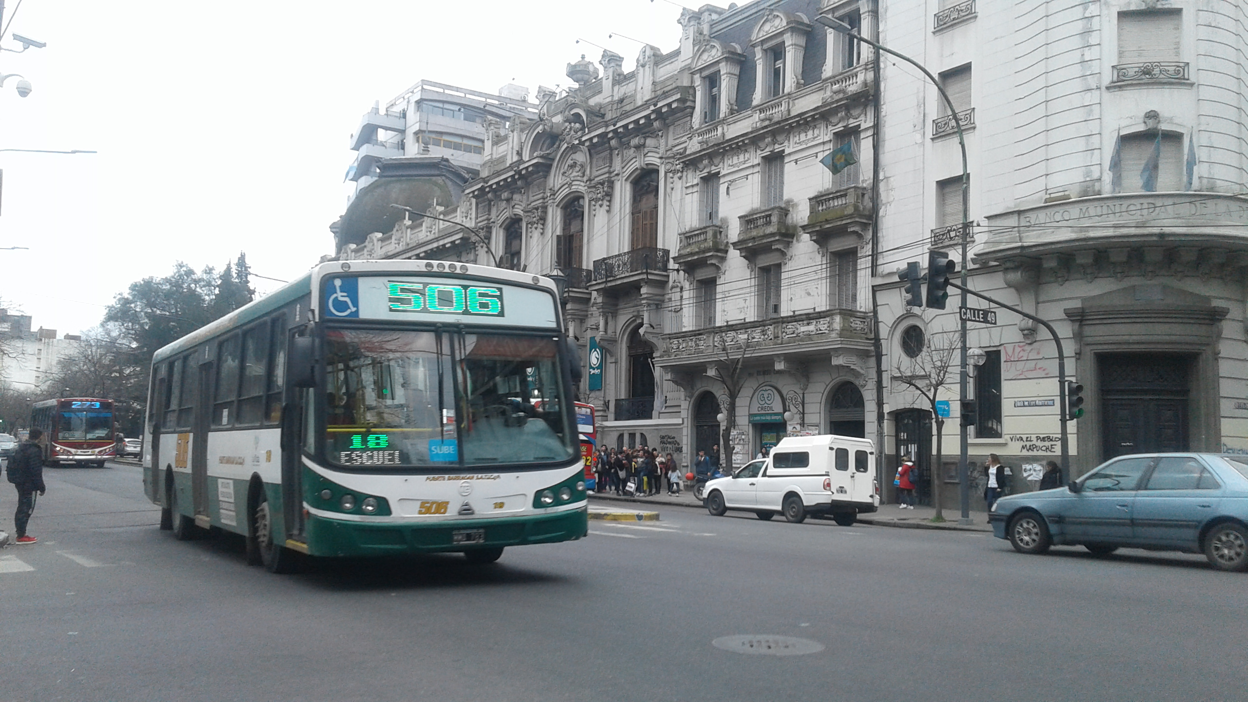 Linea 506 Interno 18. Todo Bus II MT 17